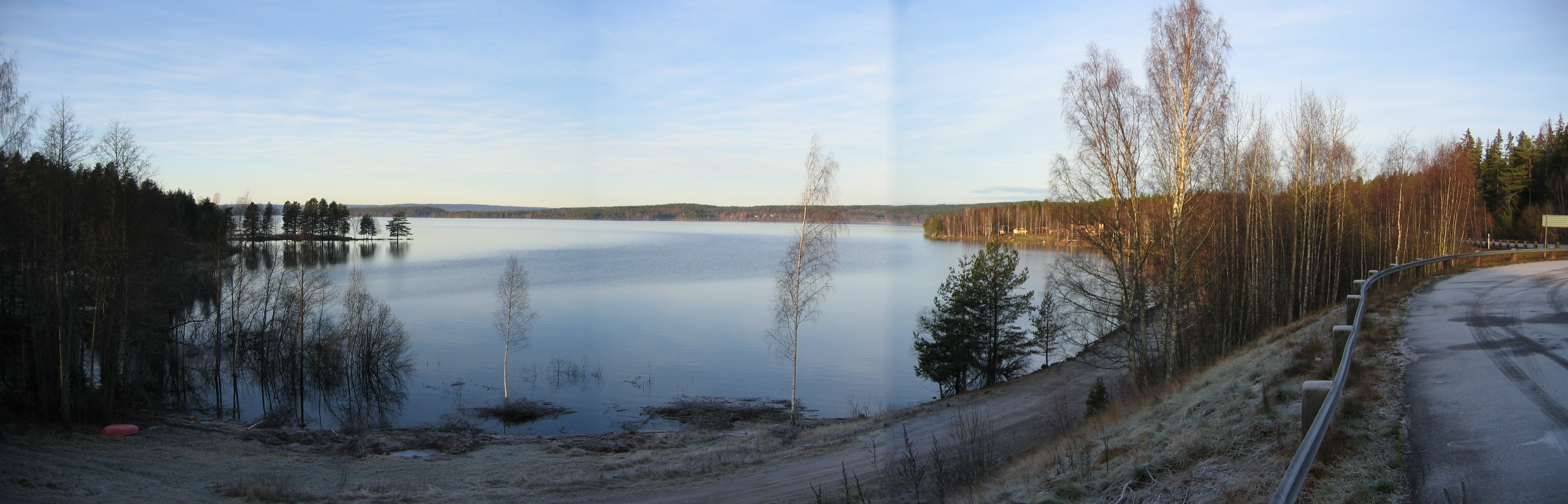 Panorama över Glafsfjorden söder om Arvika